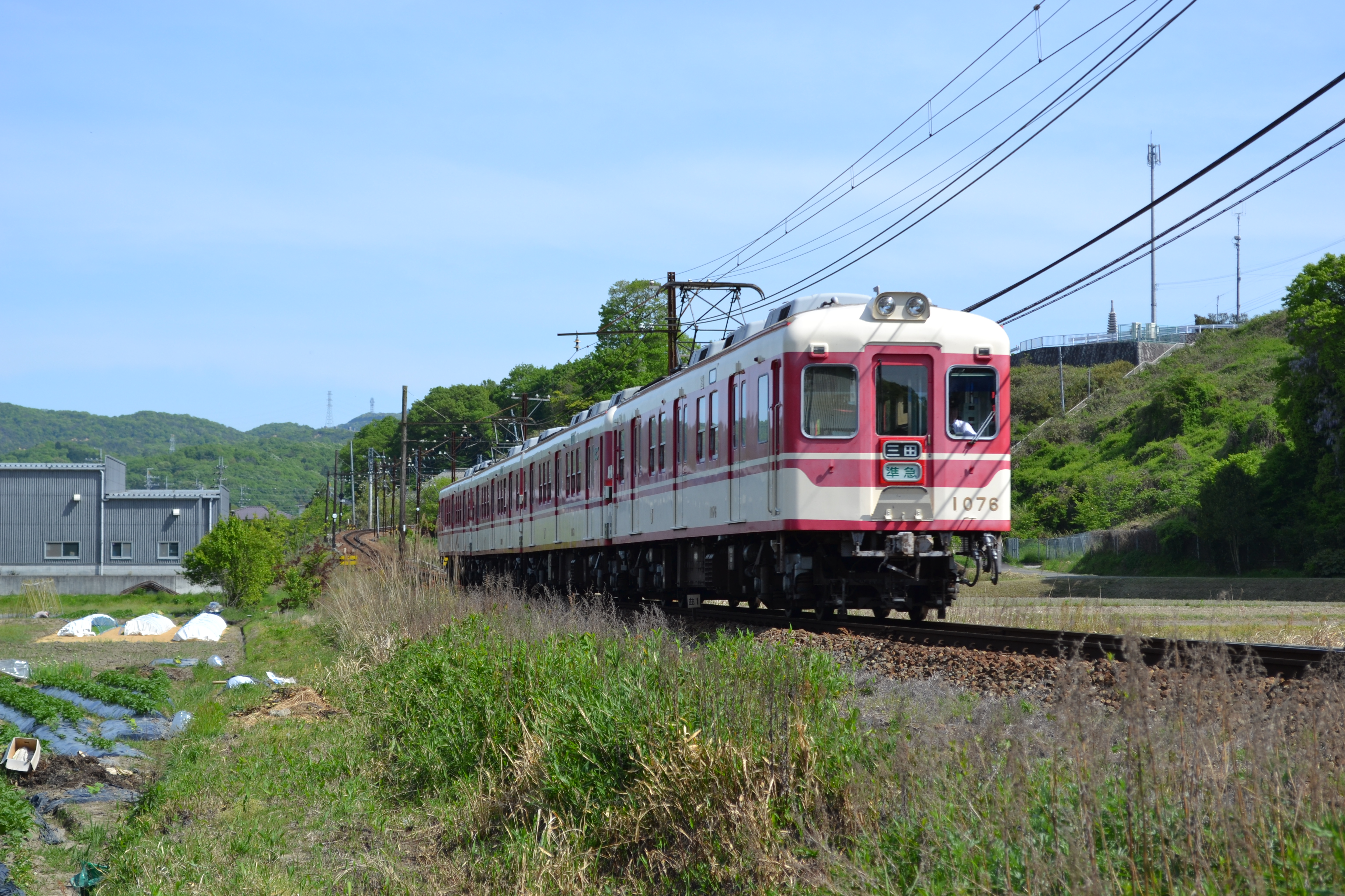 神戸電鉄1000系